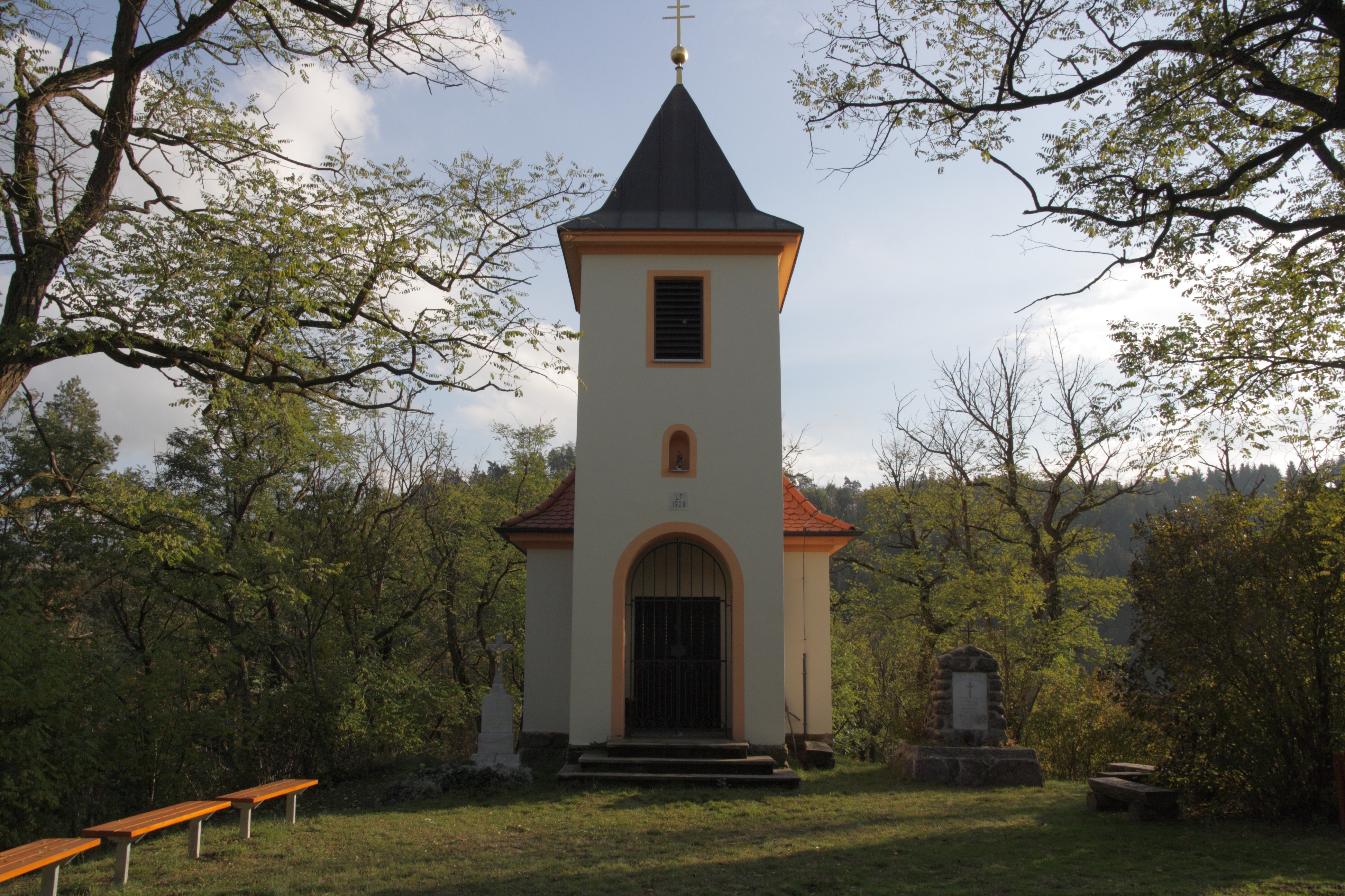 Skryje (okres Brno-venkov) - kaple svatých Cyrila a Metoděje